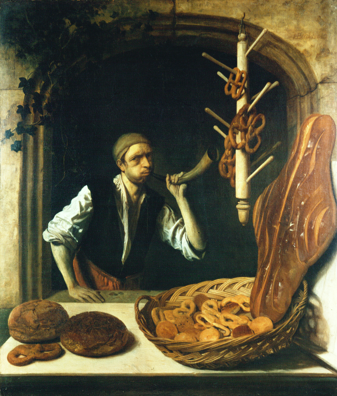 Der Bäcker, Niederlande